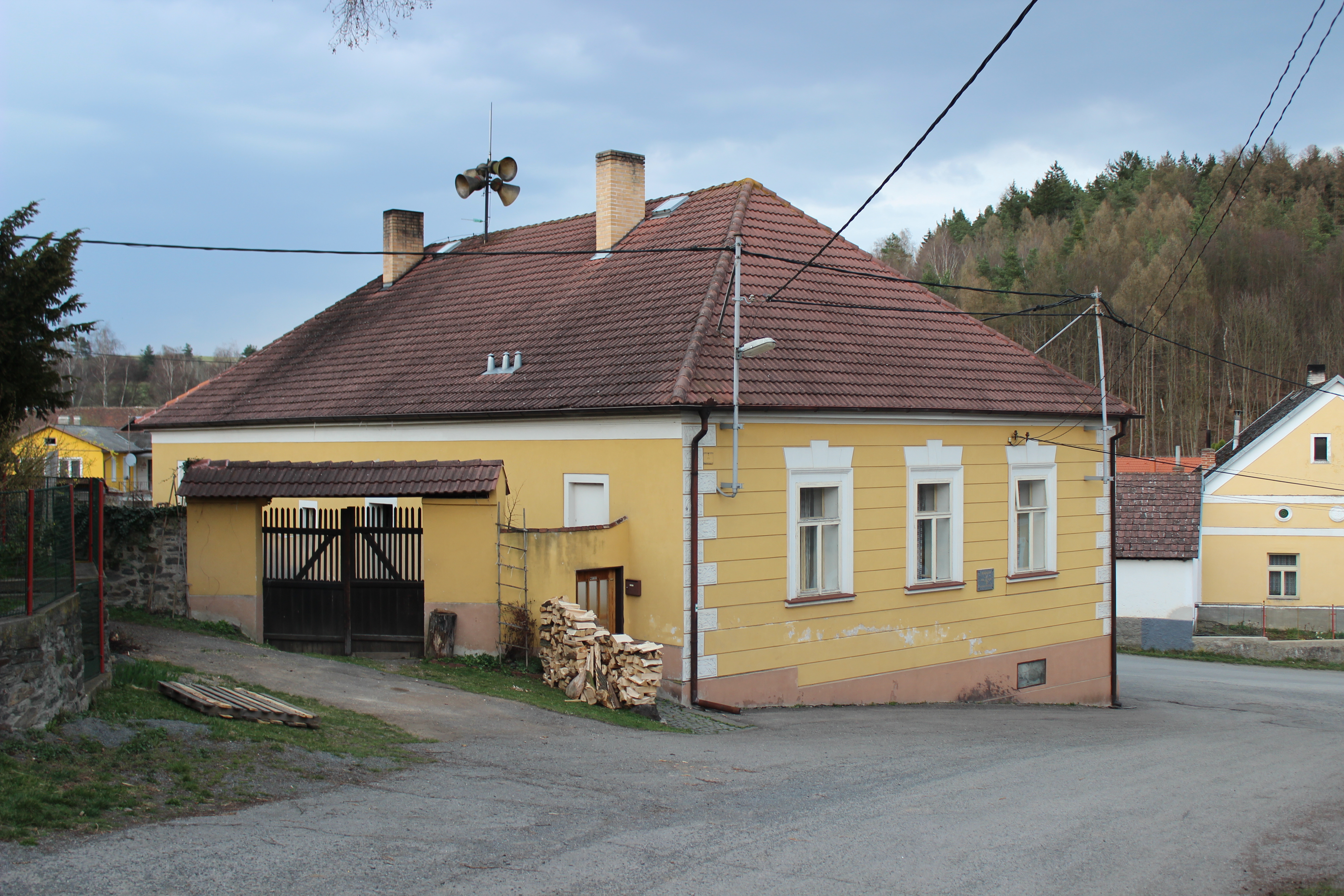 Dům číslo popisné 52 v Nahorubech. V domě sídlí místní pobočka České pošty. Pohled od jihozápadu. This photograph was taken with a Canon EOS 600D